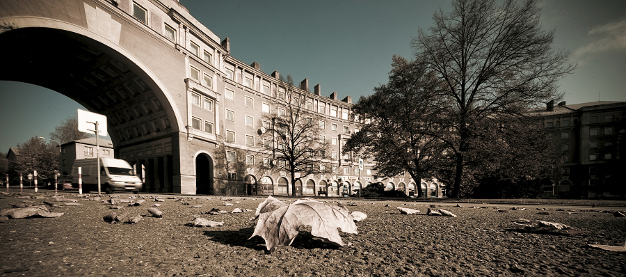 Oblouk Ostrava Poruba - SORELA